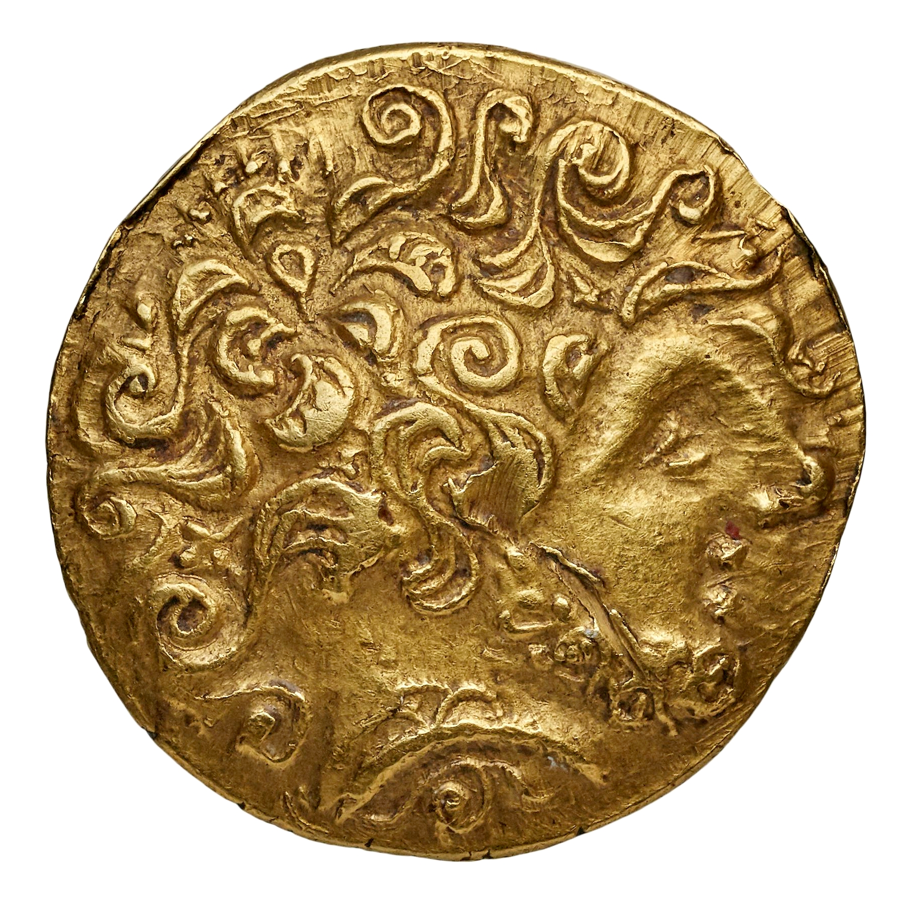 Demi-statère des Ambianis. Avers : Tête à droite stylisée. Or, 4,08 gr. Diamètre environ 16 mm. vers -100. Collection BnF : 8382 (Ancien fonds) (GAU-8800)